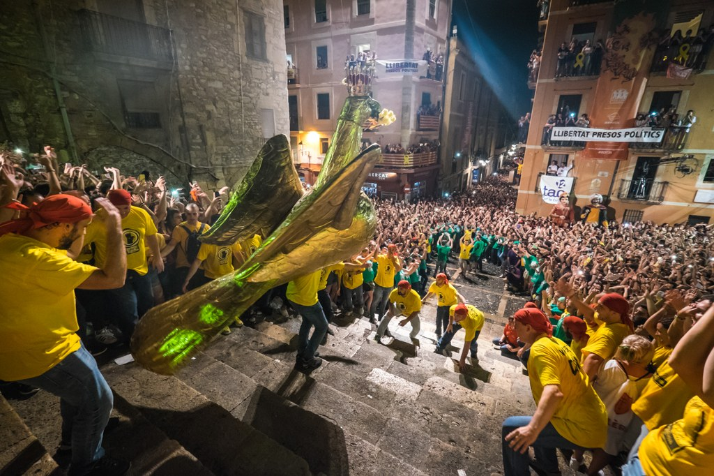 Baixada de l'Àliga a les Festes de Santa Tecla de Tarragona, que es celebra el dia 21 de setembre a la nit a les escales de la Catedral de la ciutat.